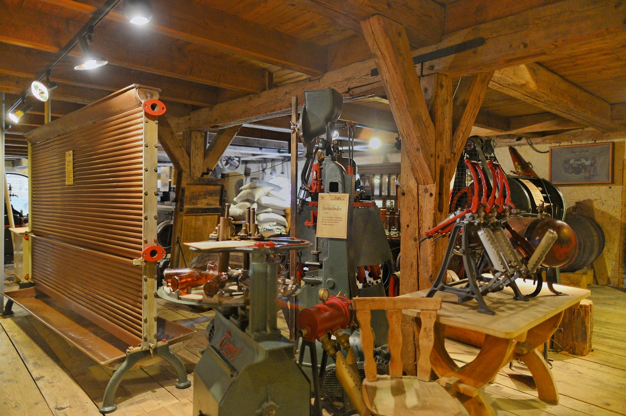 Irseer Klosterbräu: Brauereimuseum; Innenansicht